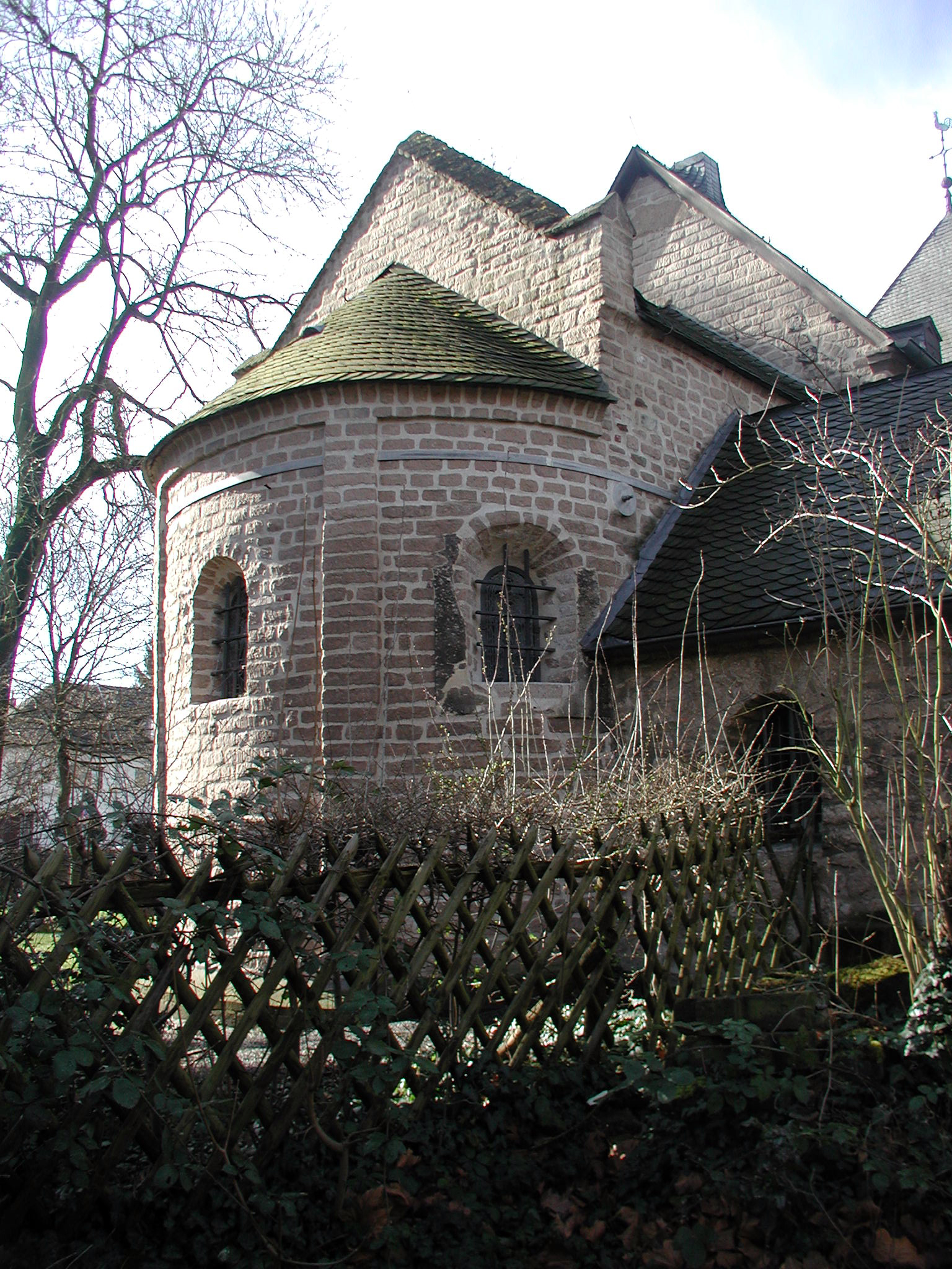 Köln-Lindenthal, Krieler Dömchen